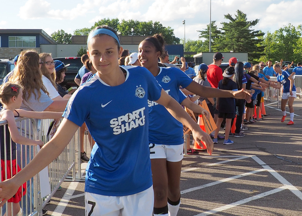 FCKC vs ORLANDO 5-28-16